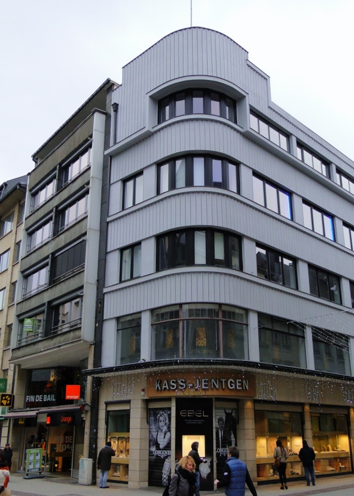 Fréiert Gebai Meta Brahms an der Groussgaass, Stad Lëtzebuerg